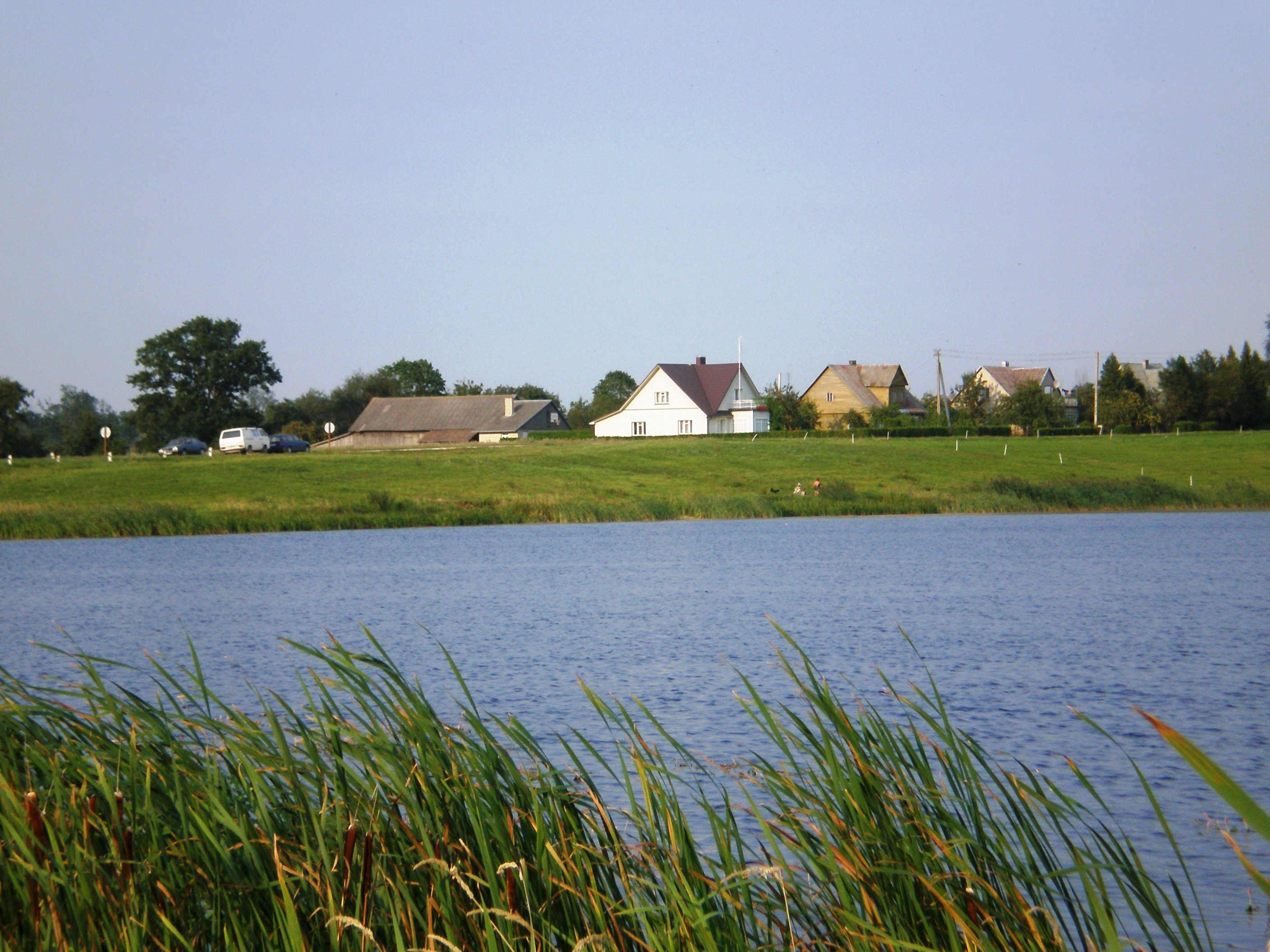 Pamėkliai